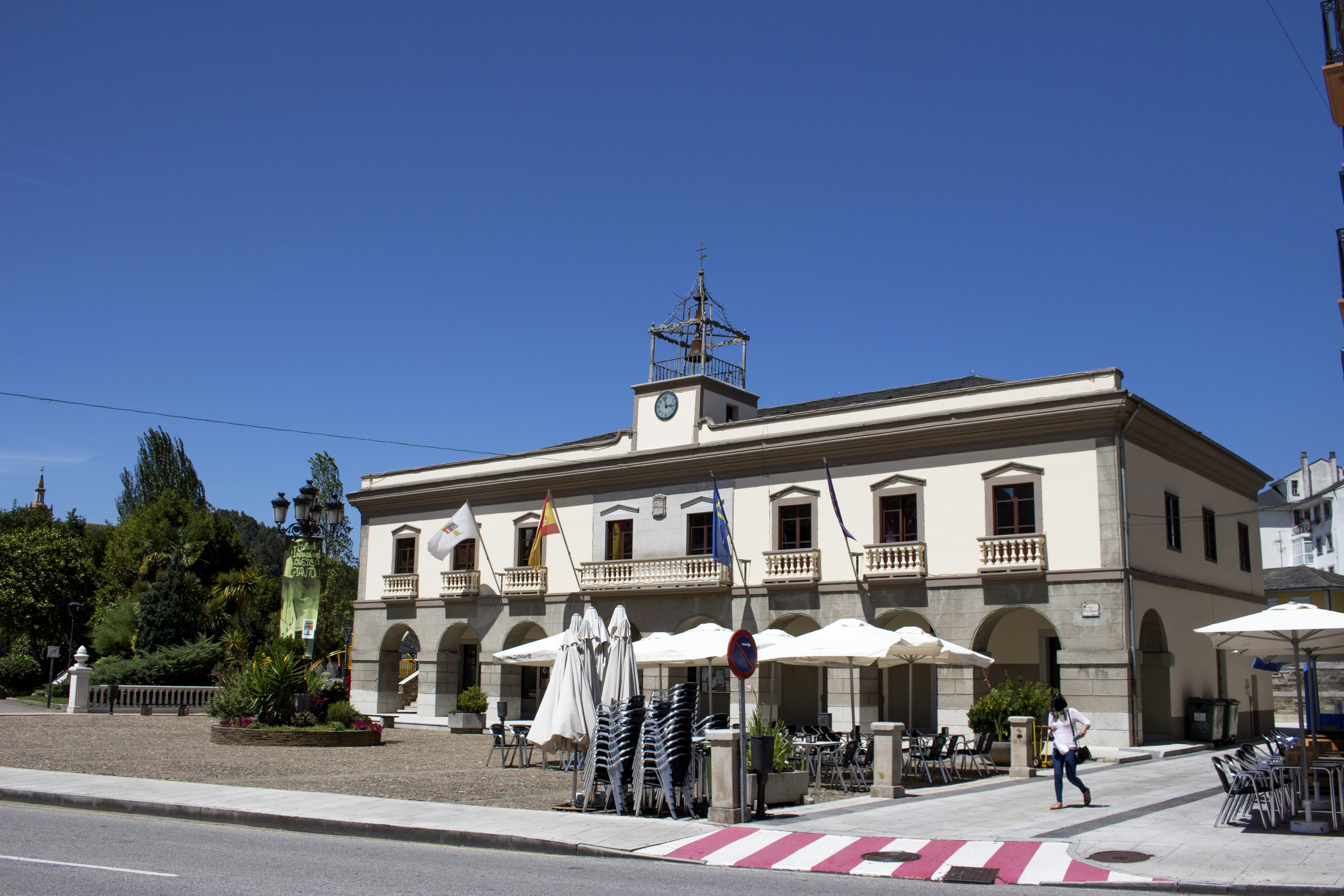 Vegadeo (Asturias)